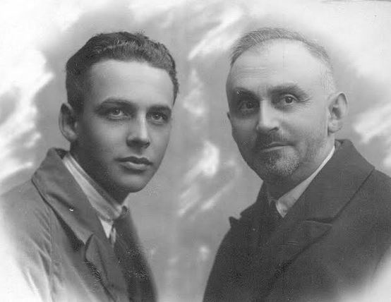 משה גרשון פלדשטיין עם בנו חיים פלדשטיין